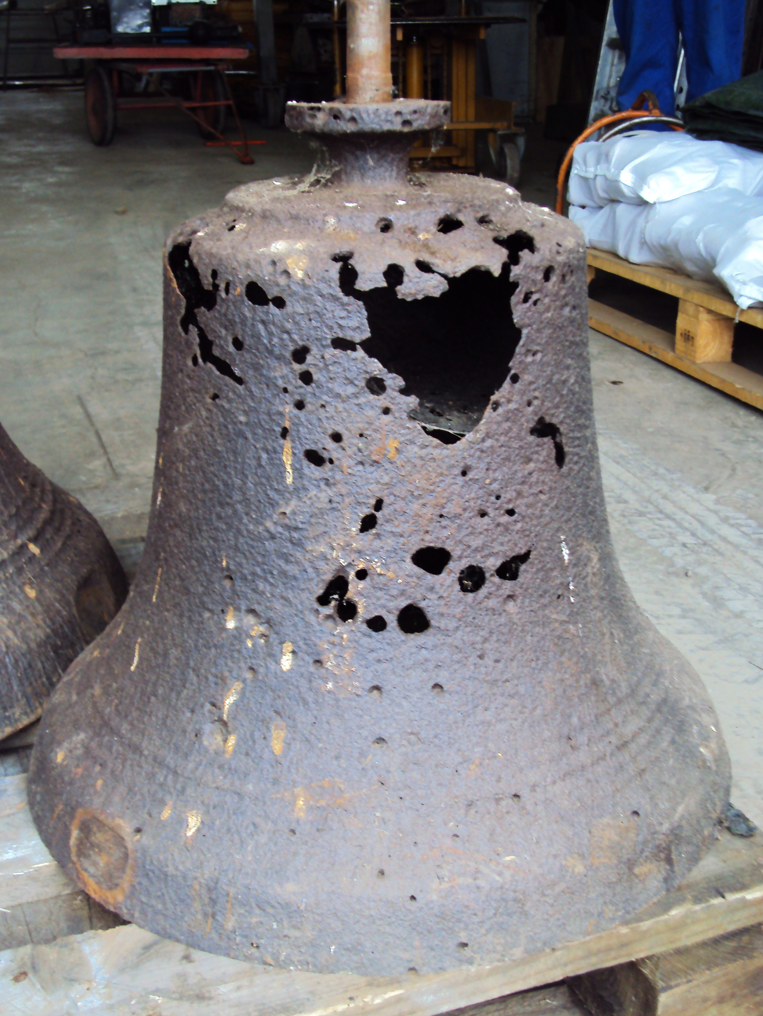 Starkt korrodierte (zerfressene) Eisenglocke.